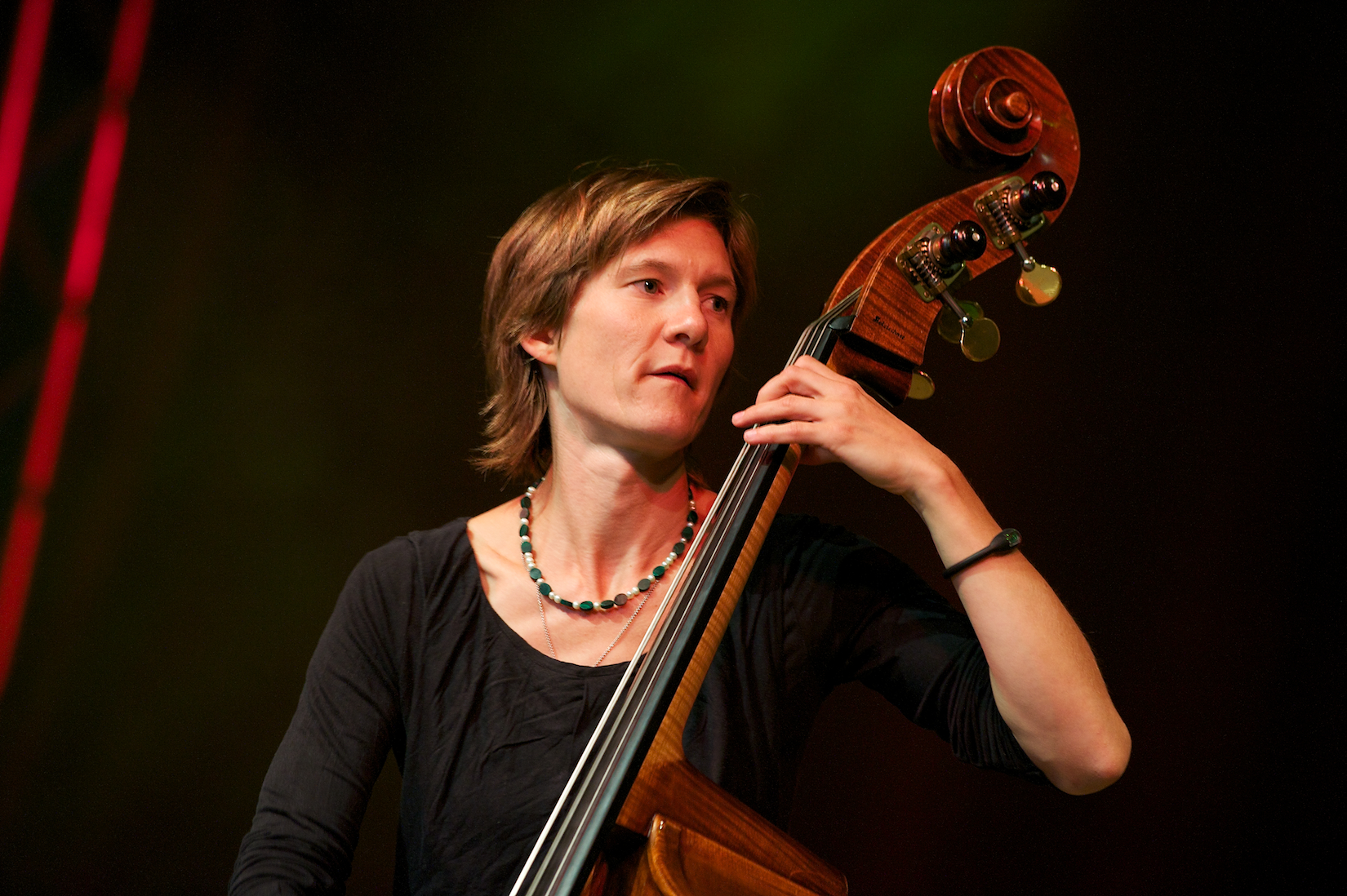 Eva Kruse bei einem Auftritt von [em], Würzburger Hafensommer, 08.08.2010